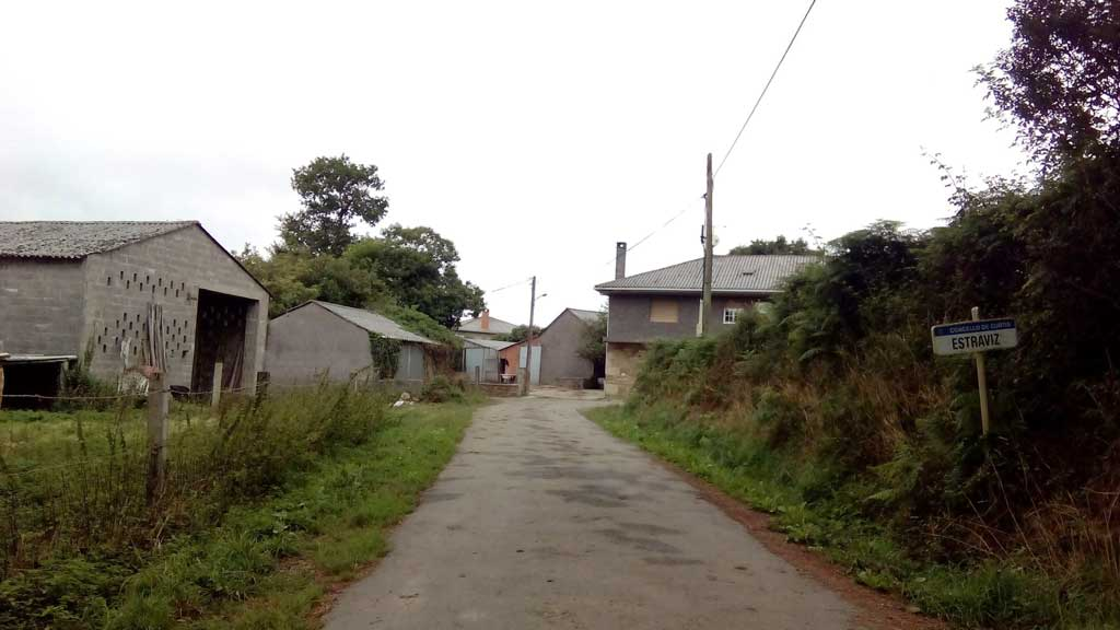 Vista de Estraviz, Curtis.